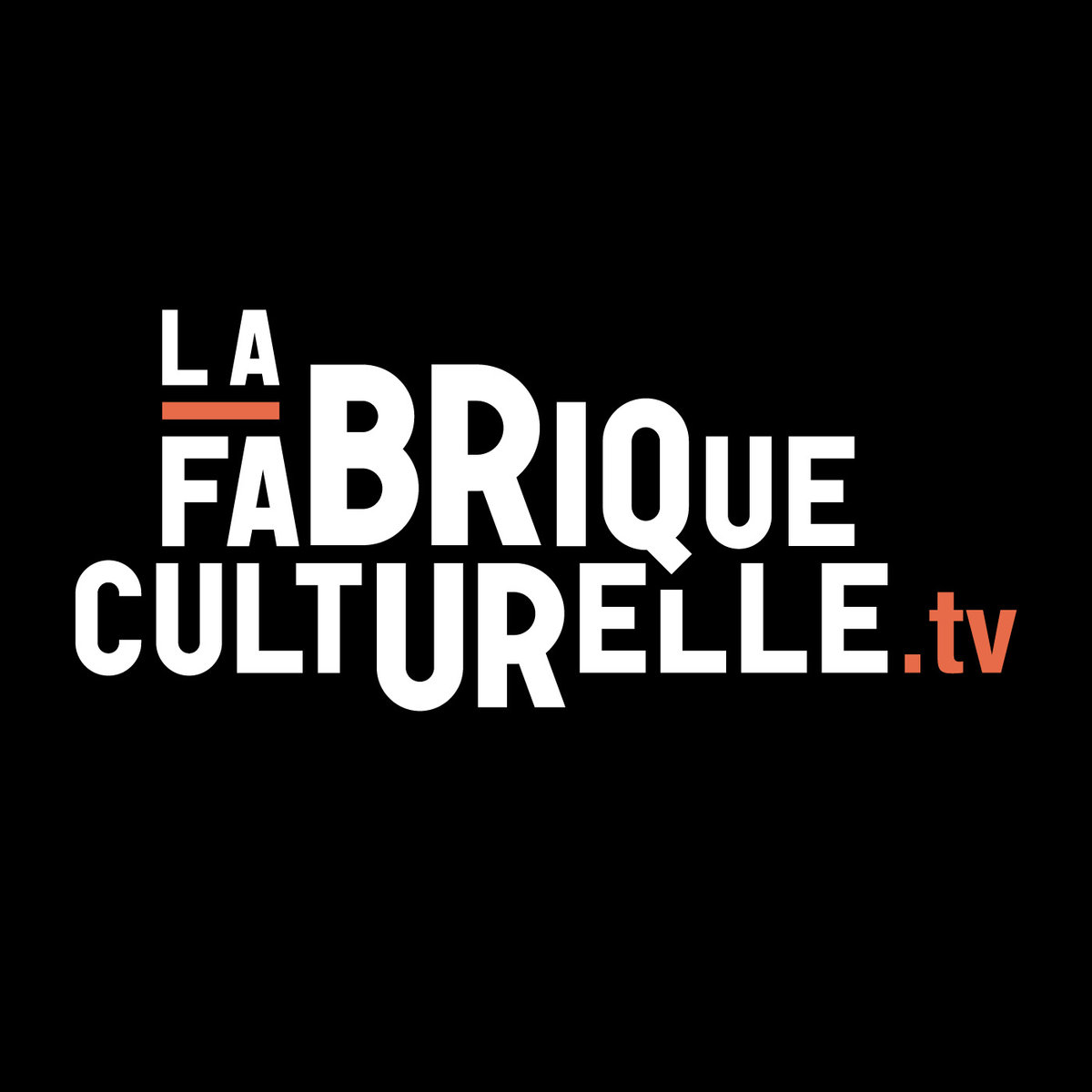 Logo noir, blanc et orange de la Fabrique culturelle.